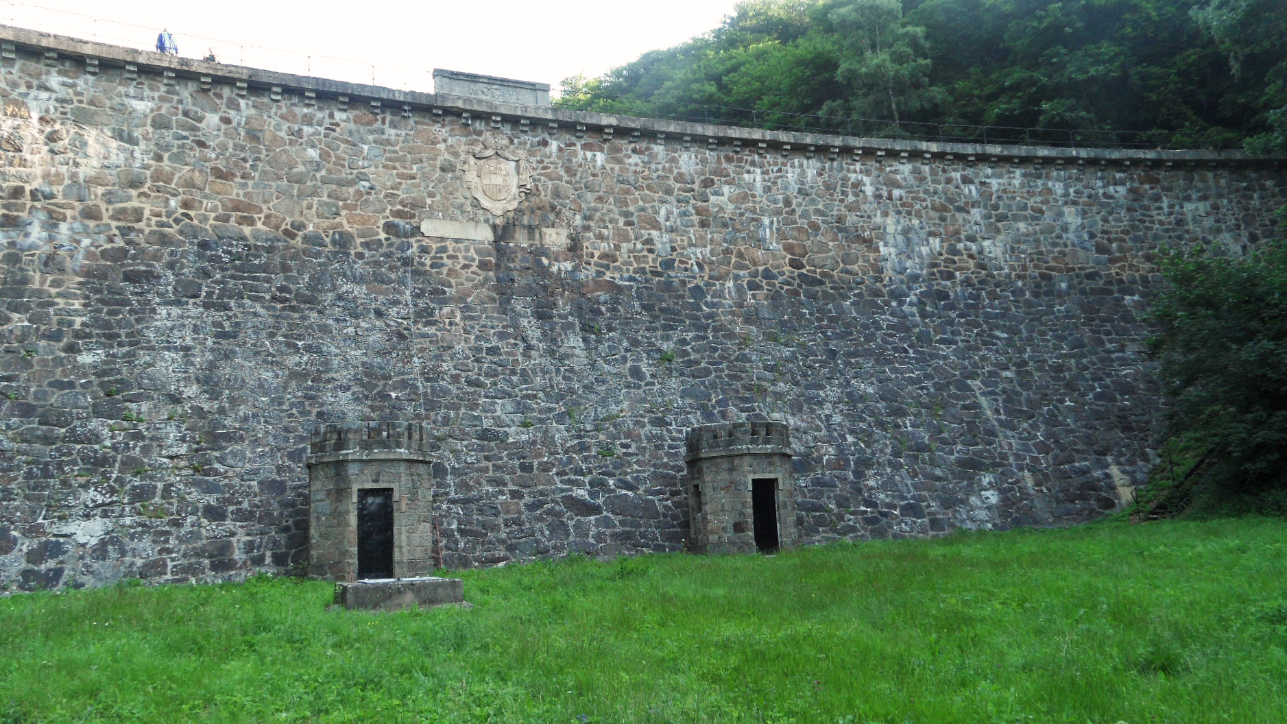 Přehrada (Jezeří), k. ú. Jezeří a k. ú. Podhůří u Vysoké Pece (okr. Chomutov), Jezeří